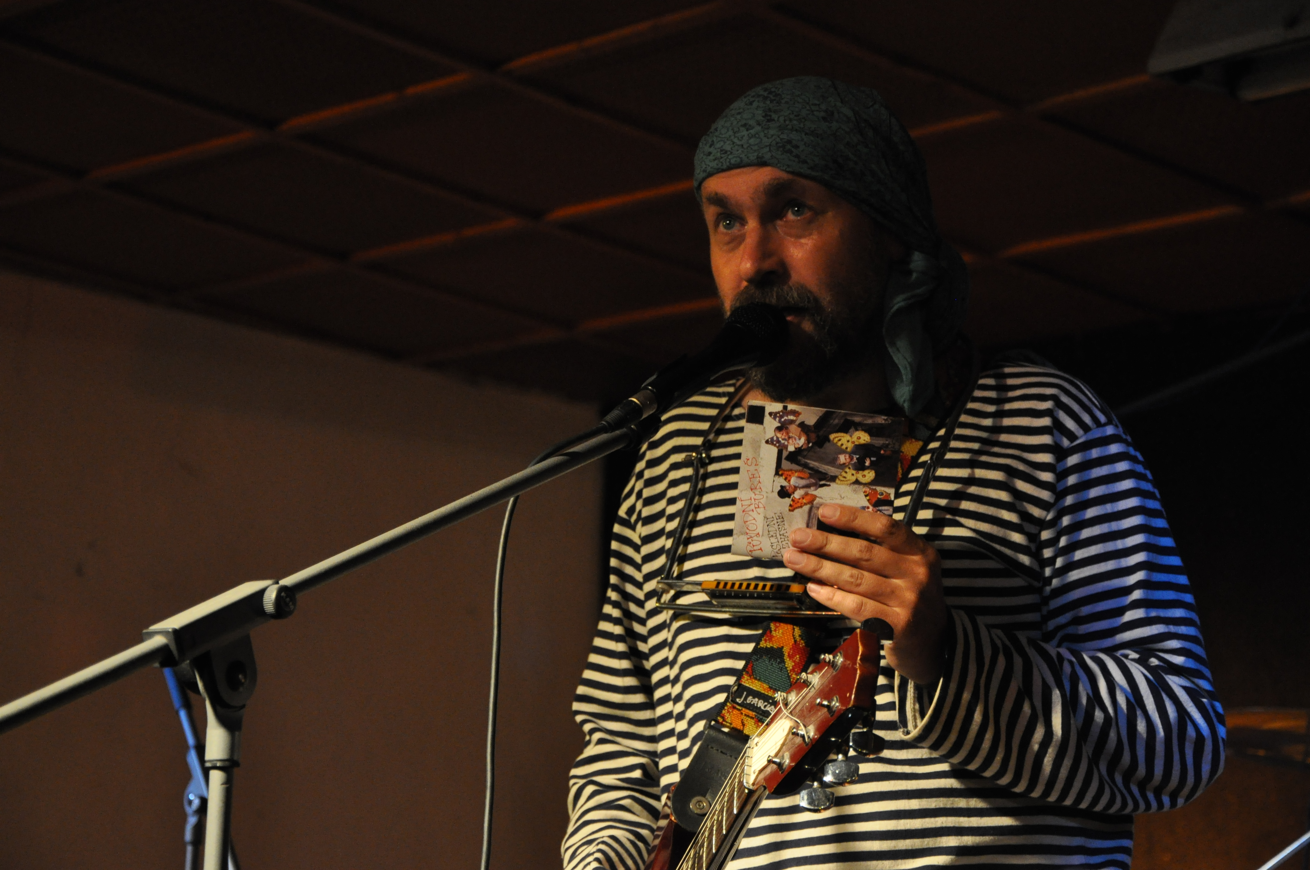 Původní Bureš na festivalu Otevřeno Jimramov 2009